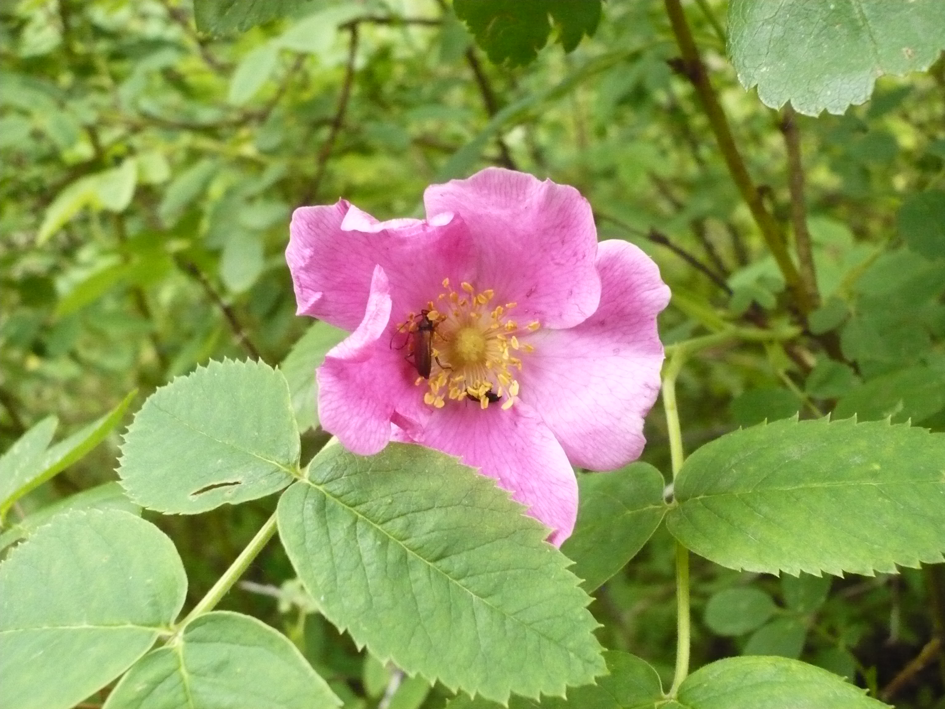 Шиповник майский, соцветие, окрестности Пензы, Россия